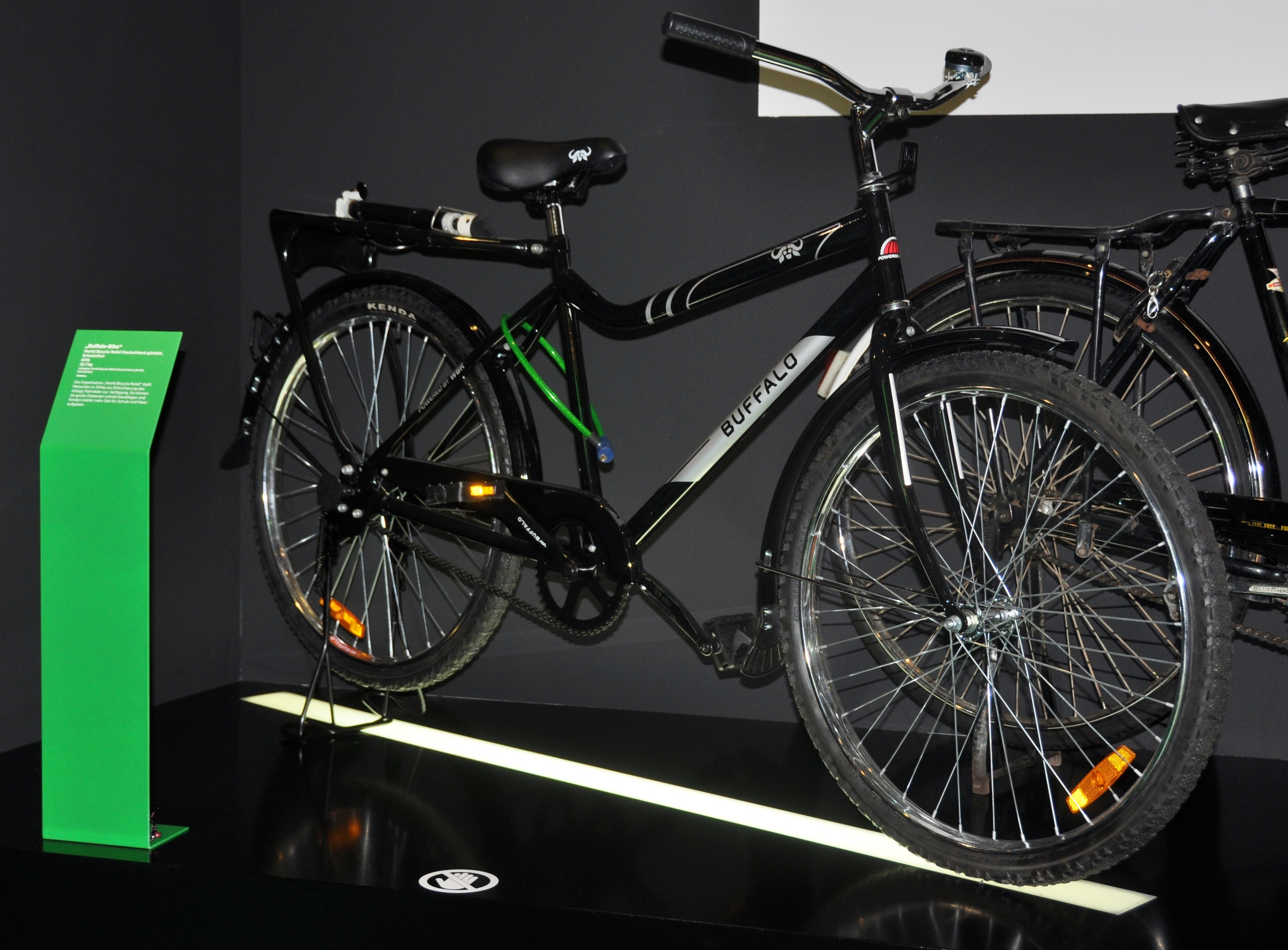 "Buffalo-Bike", World Bicycle Relief Deutschland, Schweinfurt, 2016, 22,7 kg - Leihgabe des World Bicycle Relief. Die Organisation stellt Menschen in Afrika Fahrräder zur Verfügung.